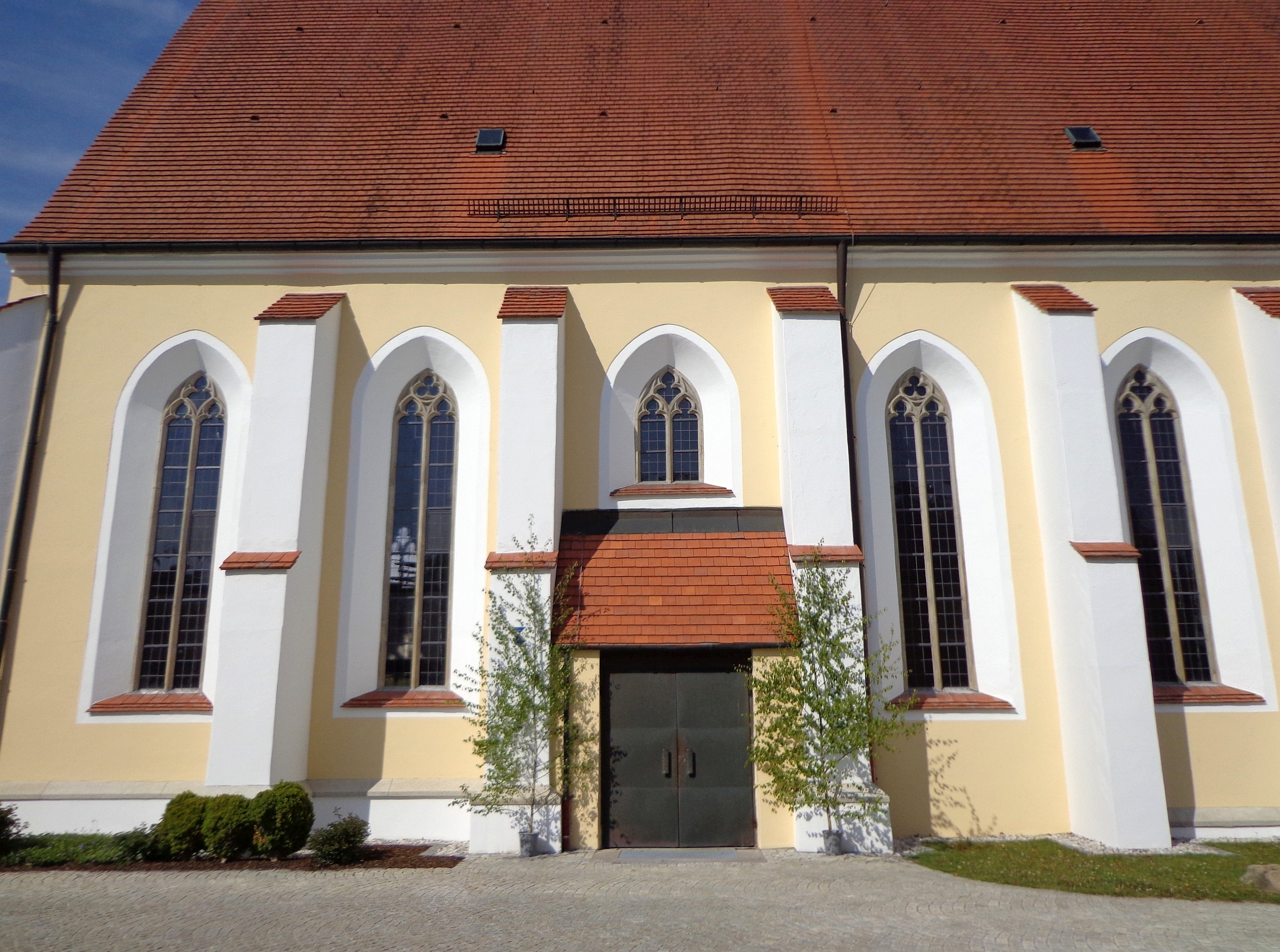 Außenansicht der Pfarrkirche St. Martin (Tettenweis)